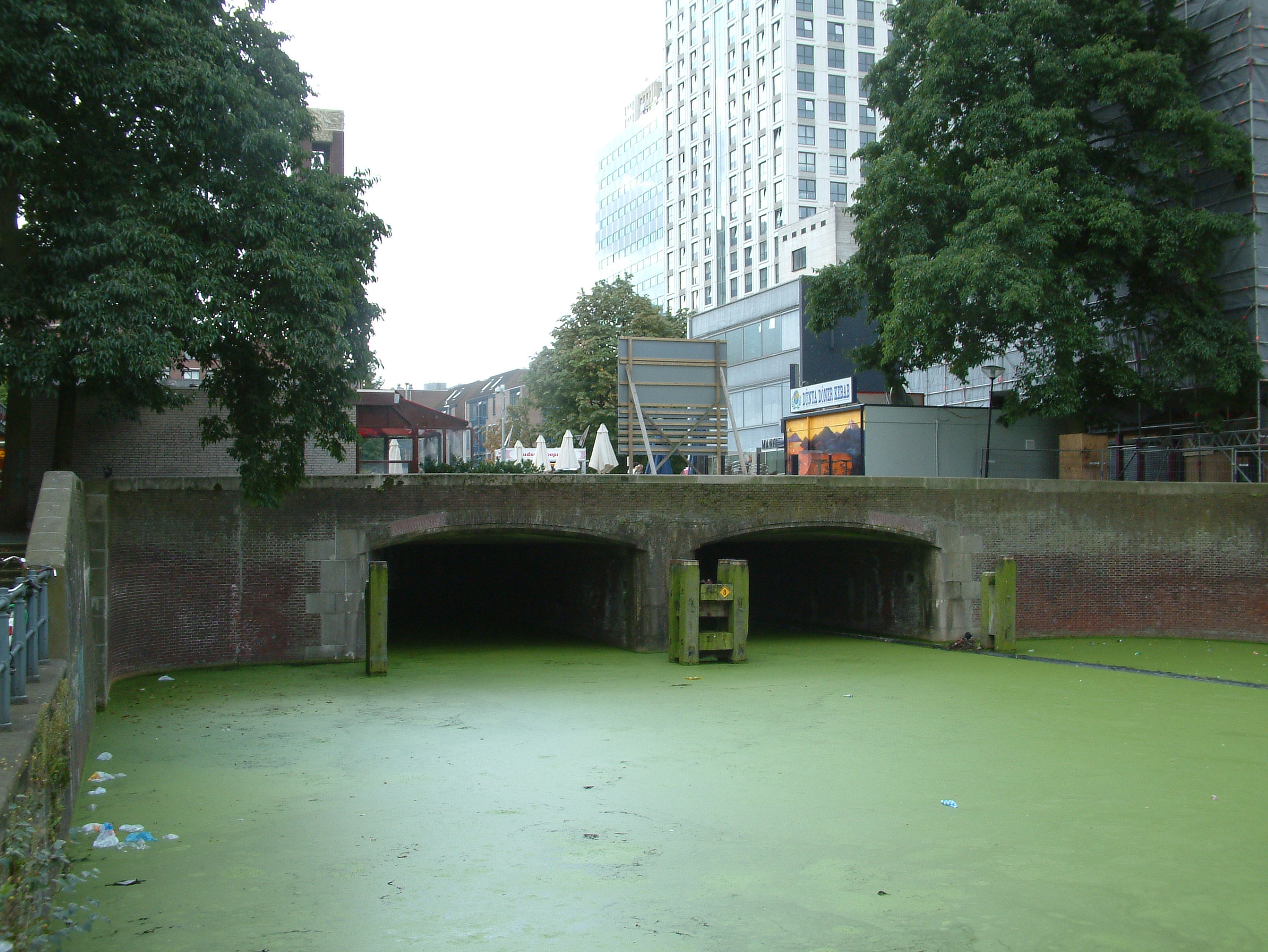 Bruggen over de Rotte, De Vlasmarktbrug, noordkant